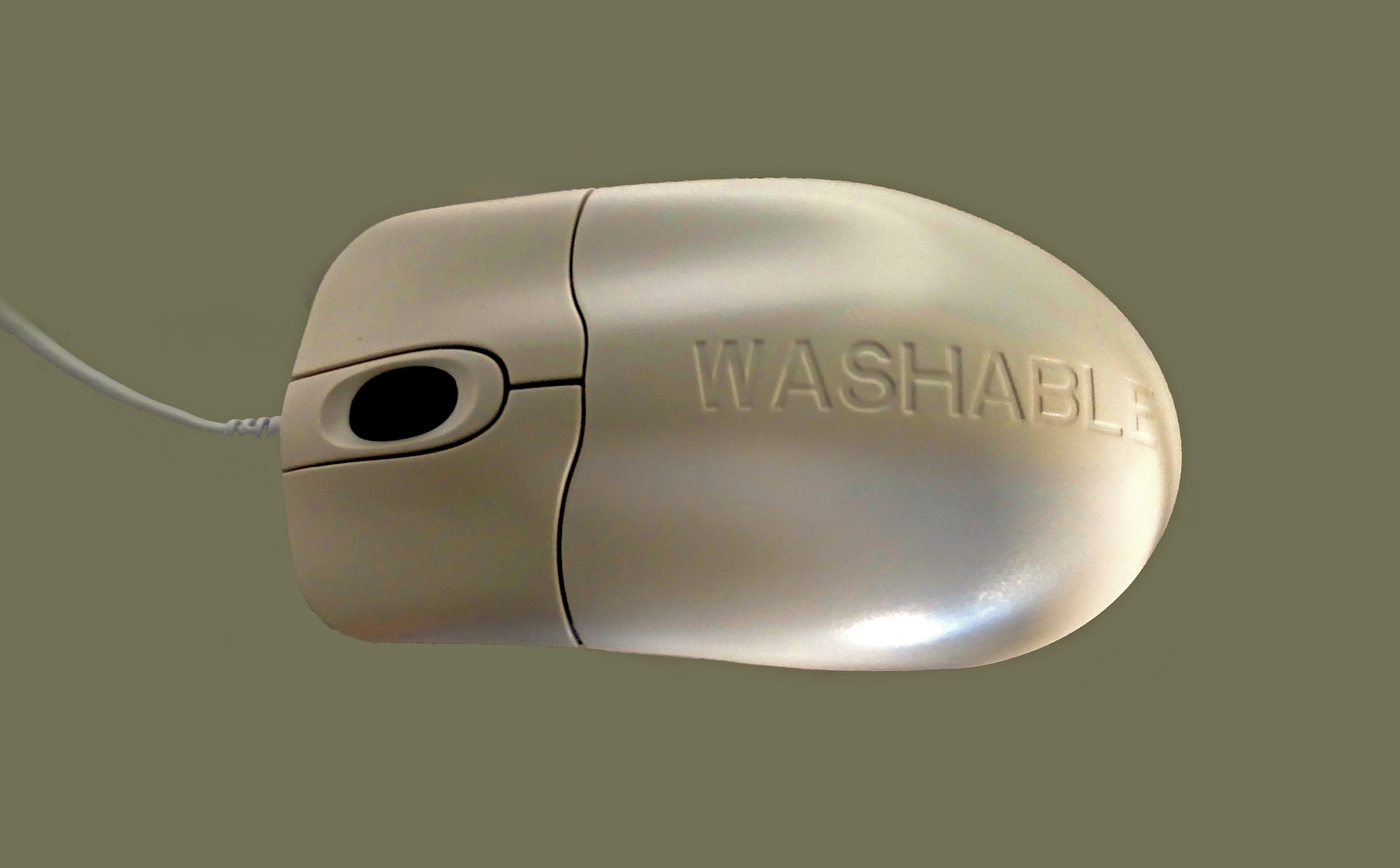 Wasch-und feucht desinfizierbare Computermaus für den Einsatz im medizinischen Bereich, Aufschrift: „Washable“